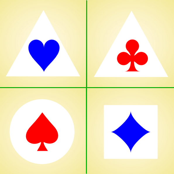 Przykładowe oznakowanie pojazdów Polskich Sił Zbrojnych na Zachodzie - wojsko Polskie we Francji Czołgi oznaczano za pomocą znaków "karcianych" Plutony miały następujące znaki: 1 pluton — pik 2 pluton — kier 3 pluton — karo 4 pluton — trefl Kolory znaków oznaczały przynależność do batalionów: 1 batalion — niebieskie znaki 2 batalion — czerwone znaki Znaki malowano na wieżach czołgu na białych polach. Kształty pola oznaczały kompanie: 1 kompania — pole okrągłe o średnicy 350 mm 2 kompania — pole kwadratowe o boku 350 mm 3 kompania — trójkąt o podstawie 450 mm i wysokości 400 mm